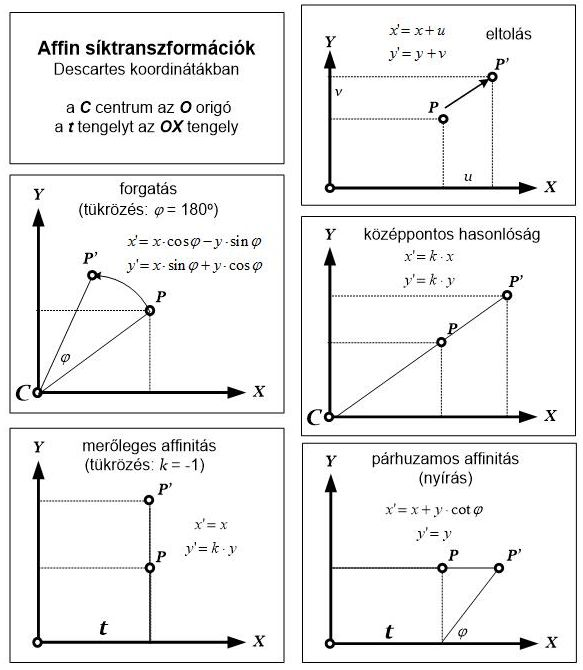 Affin transzformációk koordinátákban (2D-ben)